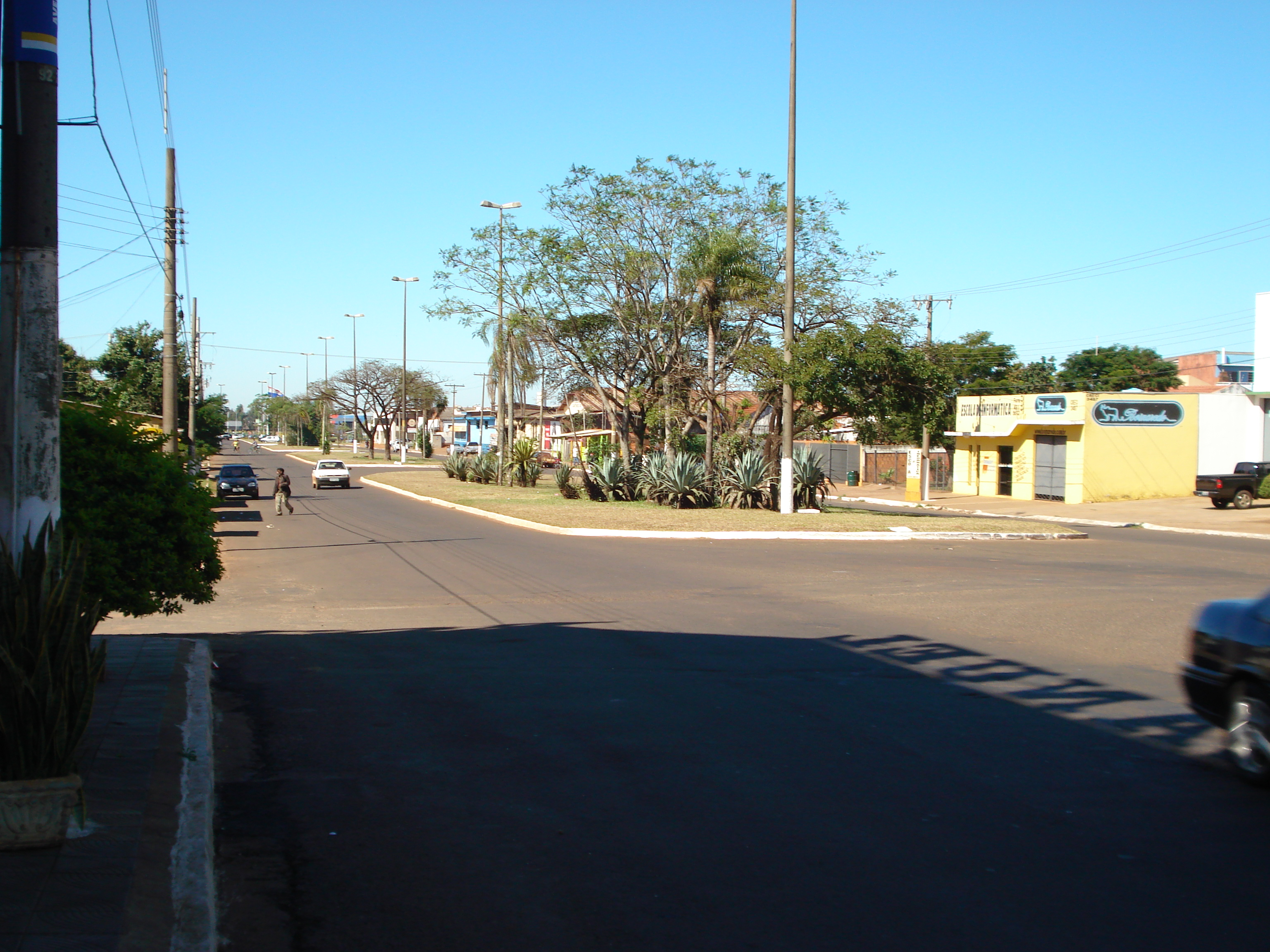 Vista parcial de Ponta Porã